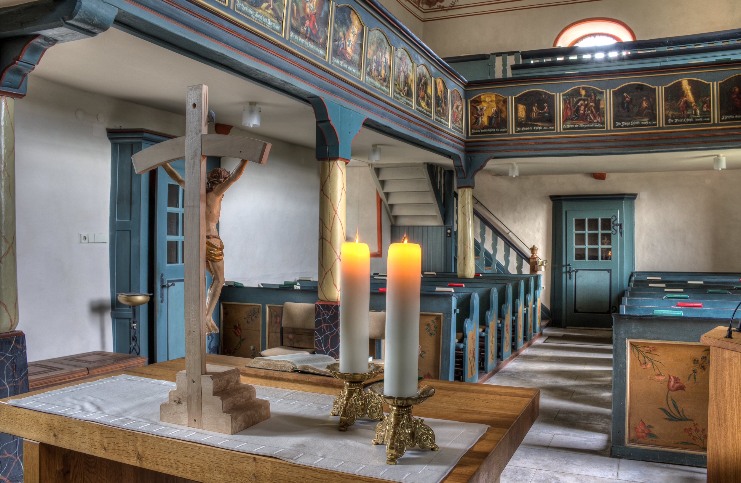 Evangelische Kirche Albach, Gemeinde Fernwald, Landkreis in Hessen, Deutschland